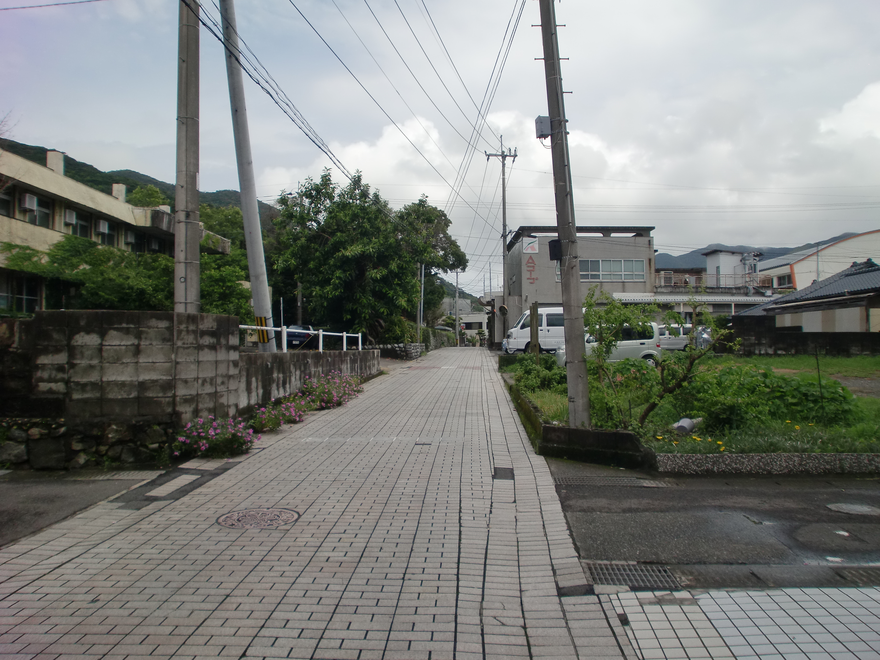 旧上甑村の中心市街地の通り